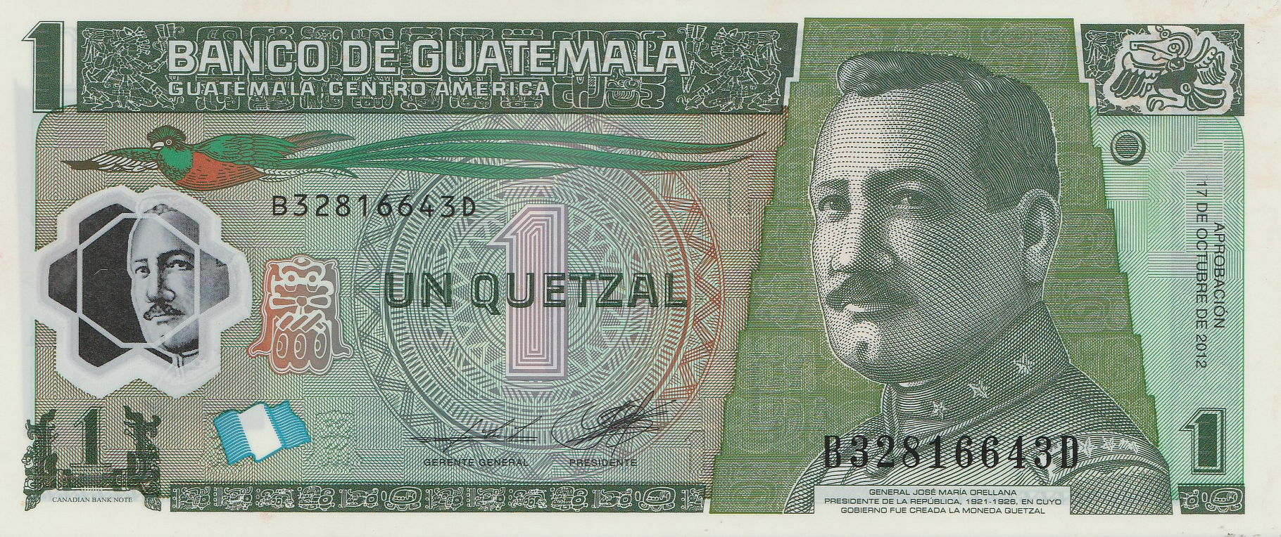 El billete es de mi propiedad